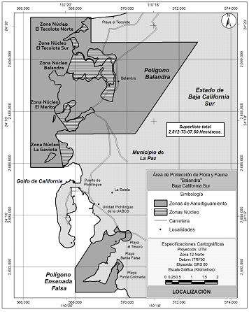 Area de protección Balandra